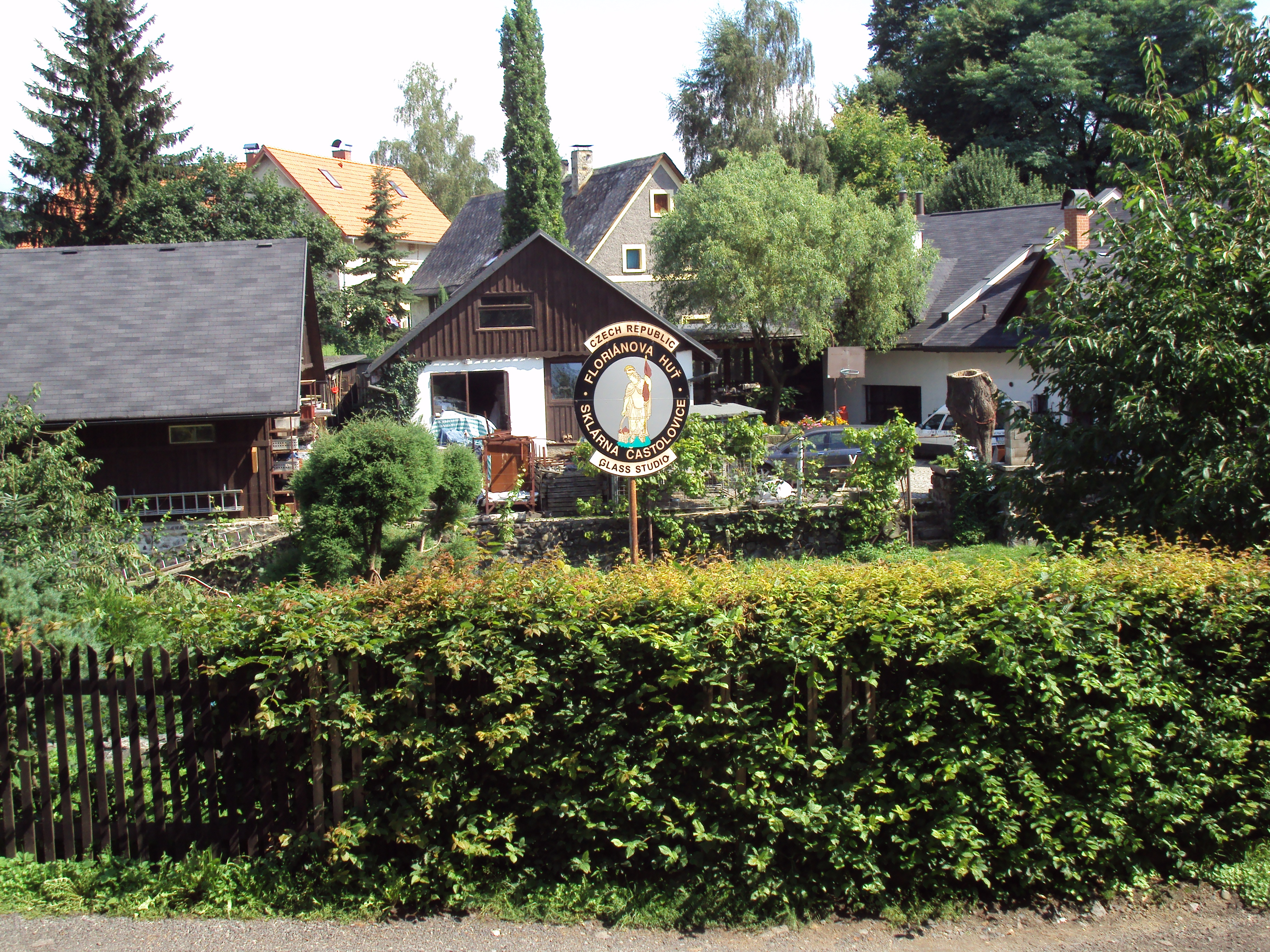 Malá sklárna v Častolovicích, připojených k městu Česká Lípa